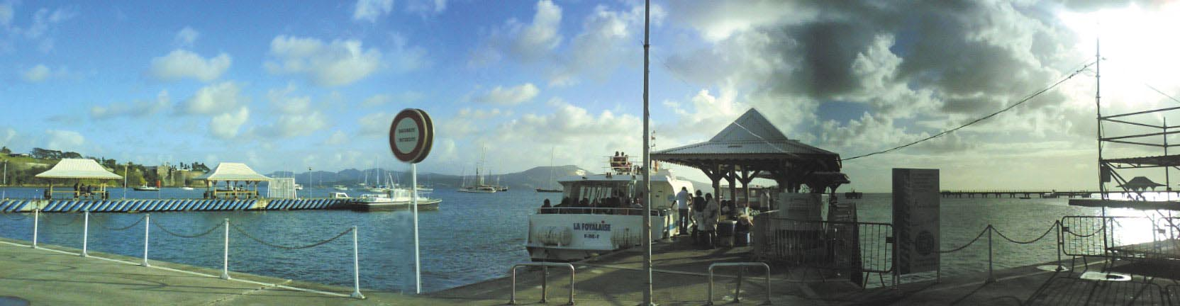 embarcadère de Fort de France